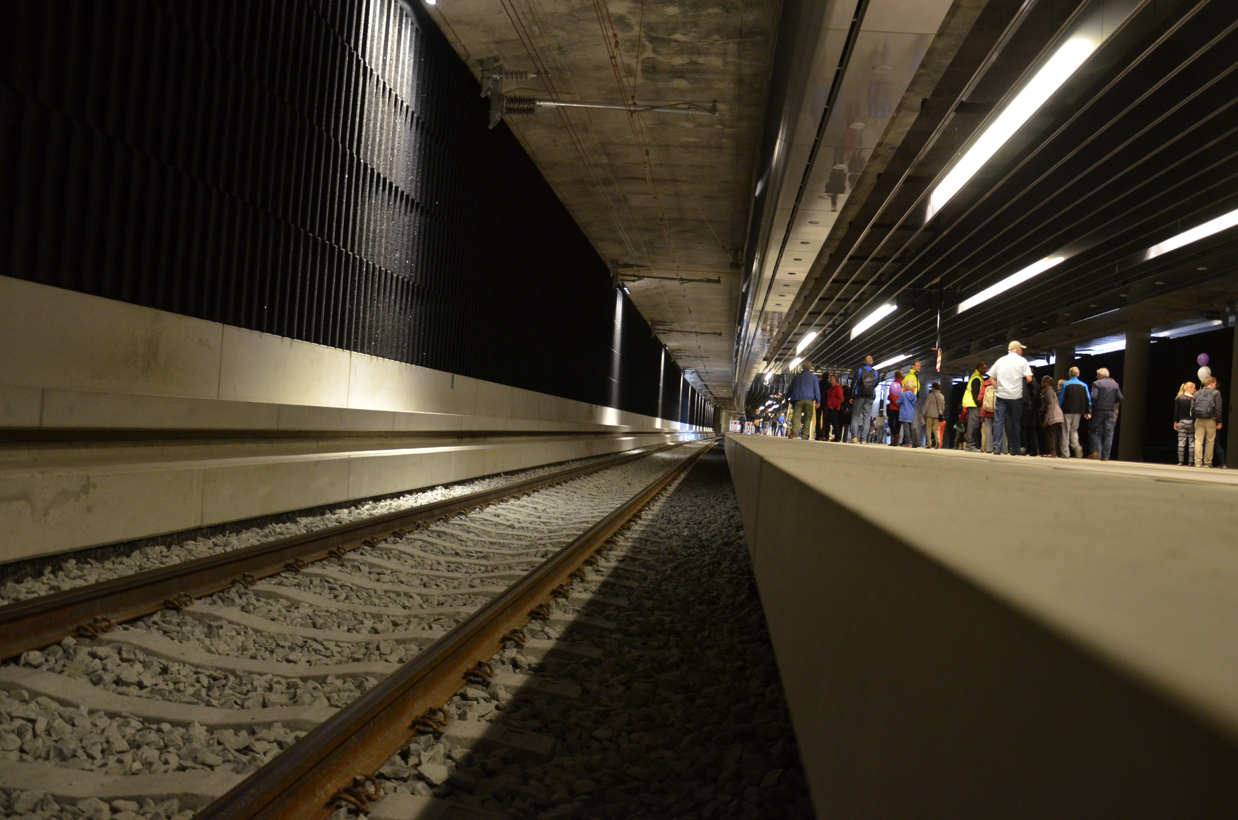 De nieuwe Delftse spoortunnel onder het nieuwe station.